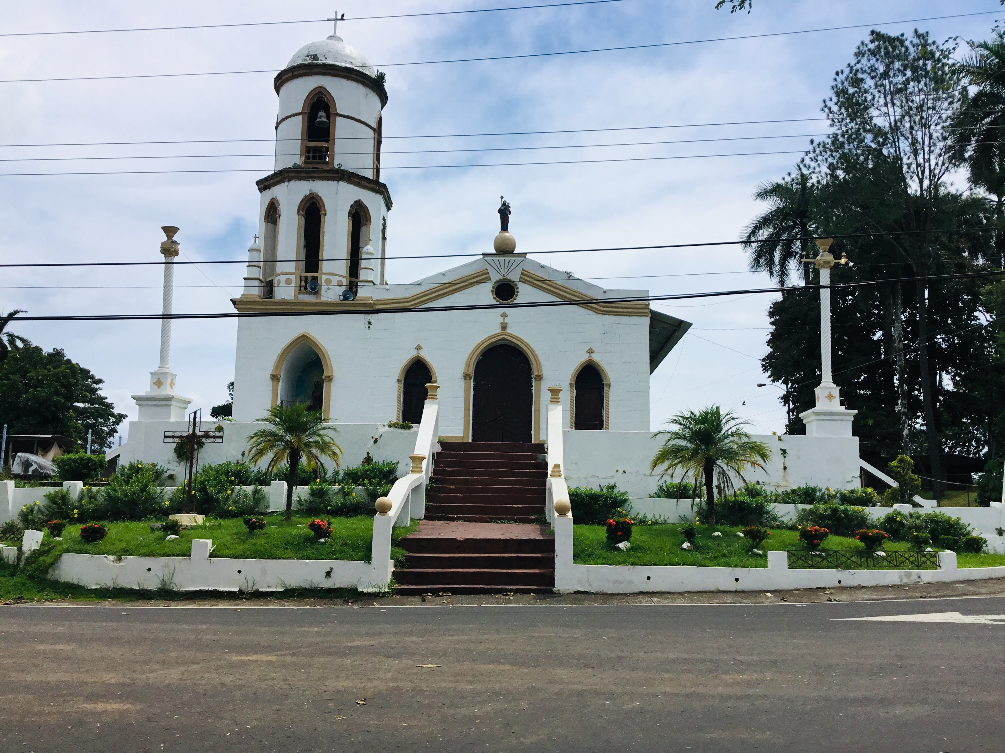 Iglesia de San José en Soná, Provincia de Veraguas, Panamá.